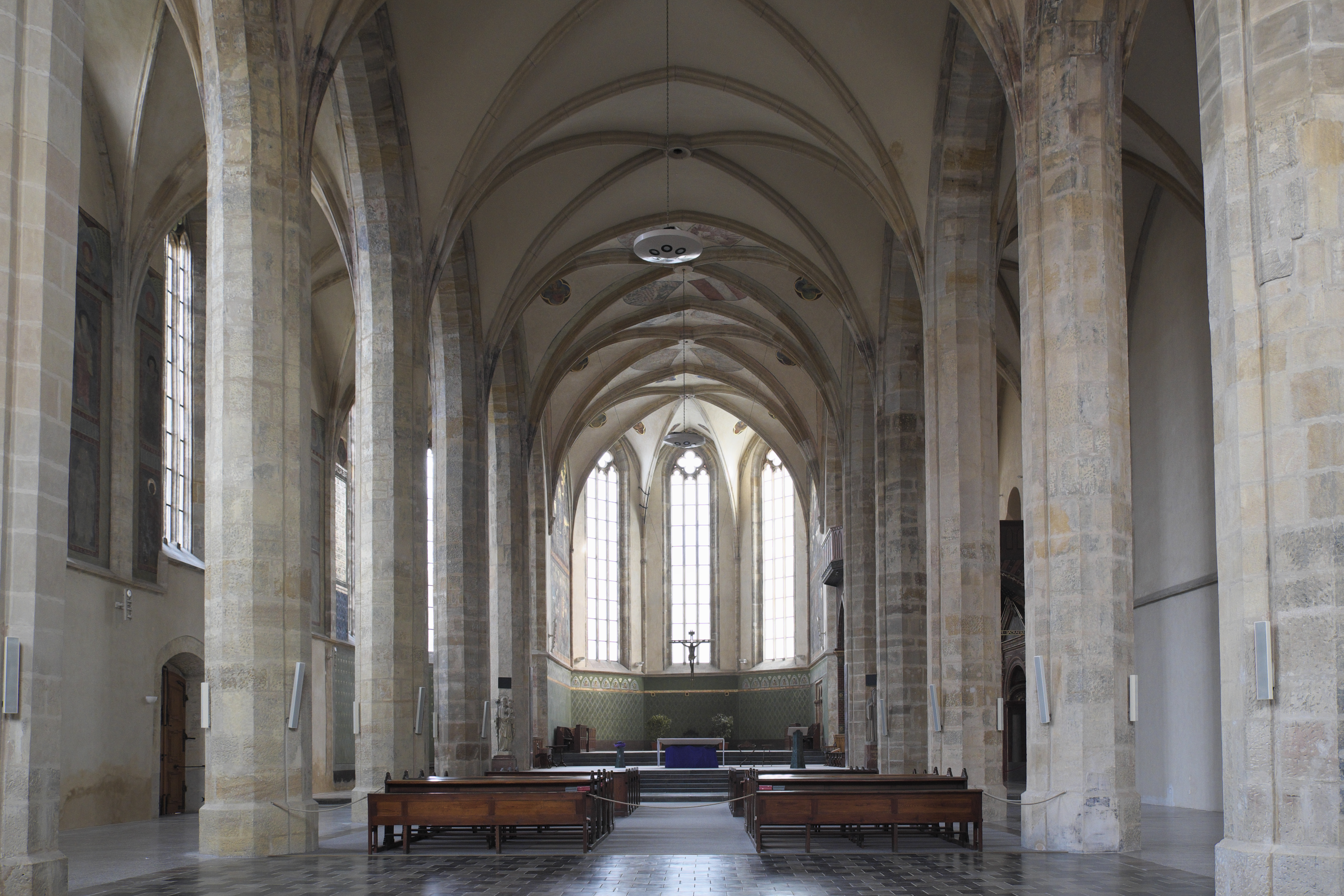 Marien-Kirche des Emmausklosters in Prag (Tschechien), Innenraum